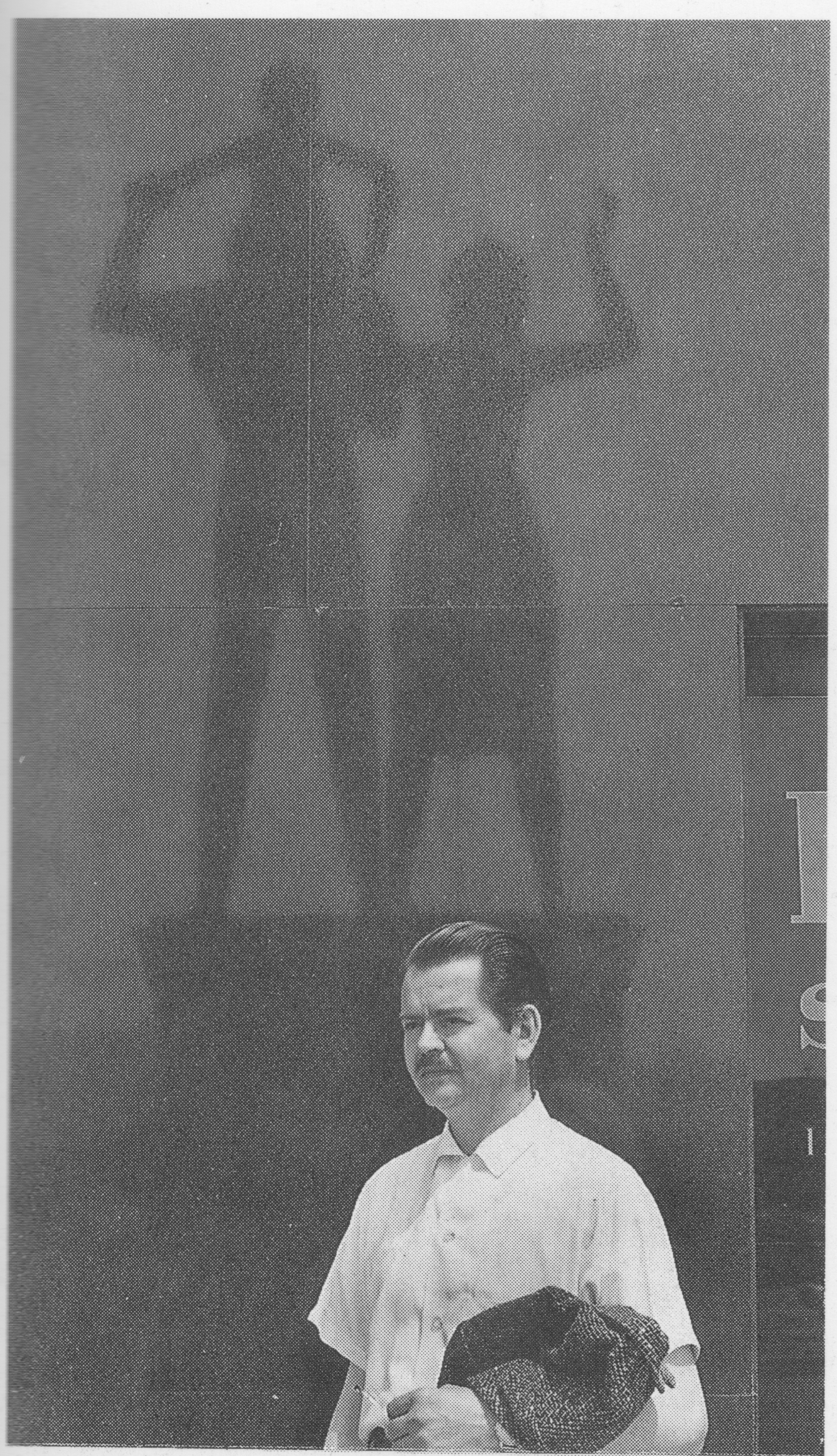 Antonio Ballester en Los Angeles, 1963. (Al fondo se proyecta la silueta del monumento "La Familia" que realizó en bronce para el Home Savings & Loan. 1963)